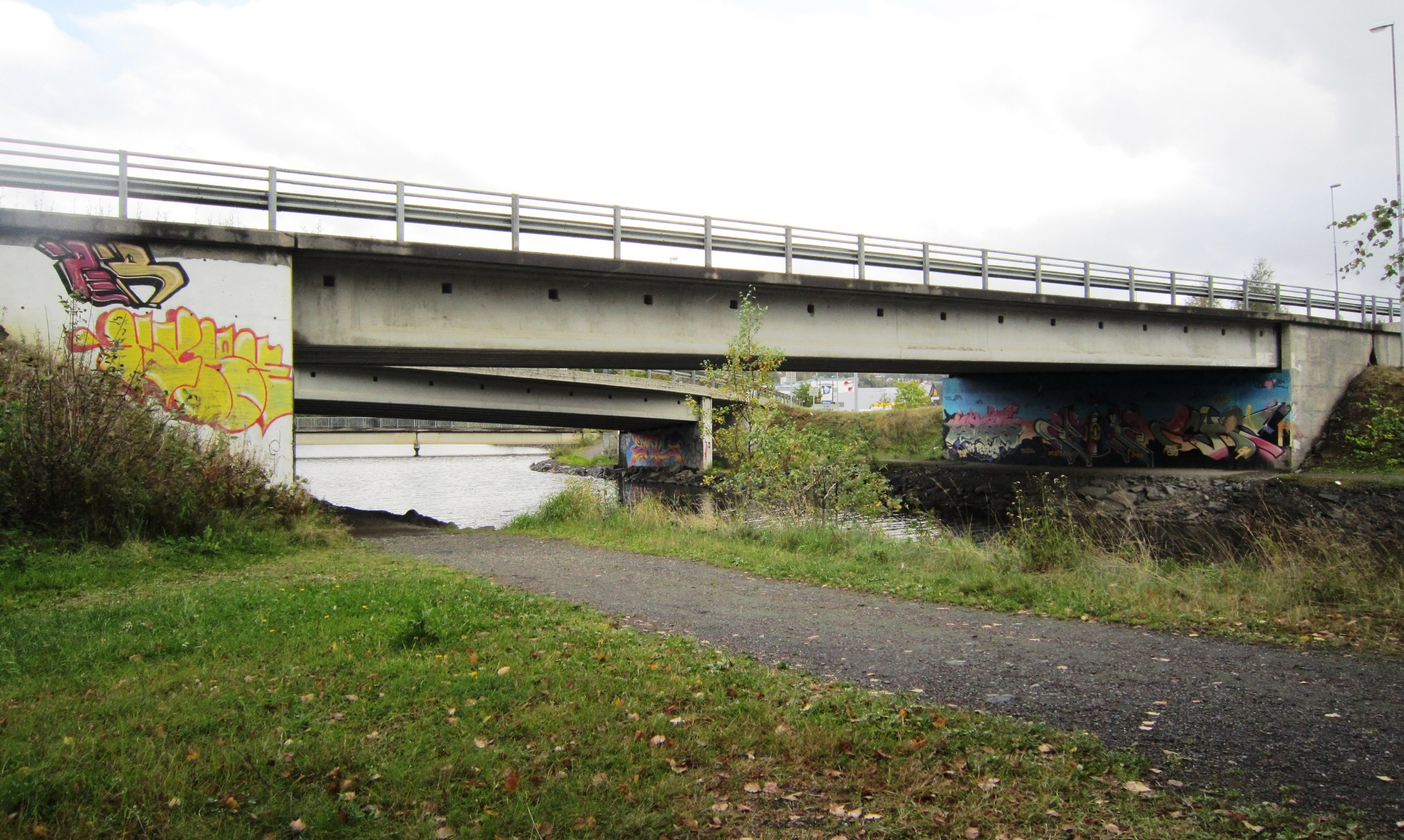 Busmoen bru med E6 ved Lillehammer. I bakgrunnen Mesna rampebru med rampe til E6.